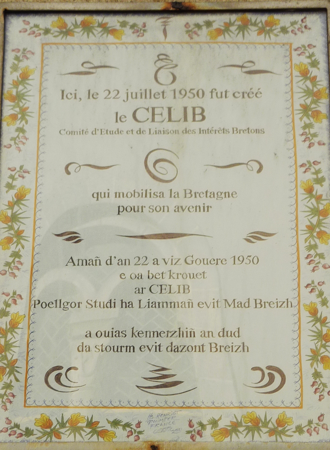 Quimper : plaque commémorative de la création du CELIB (Comité d'études et de liaison des intérêts bretons) le 22 juillet 1950 ; immeuble situé derrière l'Hôtel de ville de Quimper